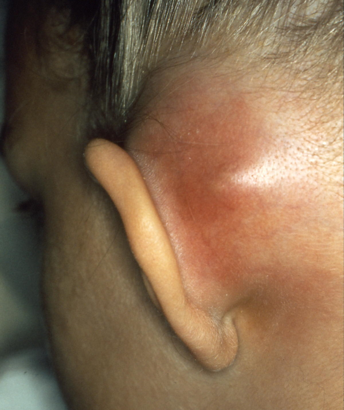 Česky: Subperiostální absces při mastoiditidě